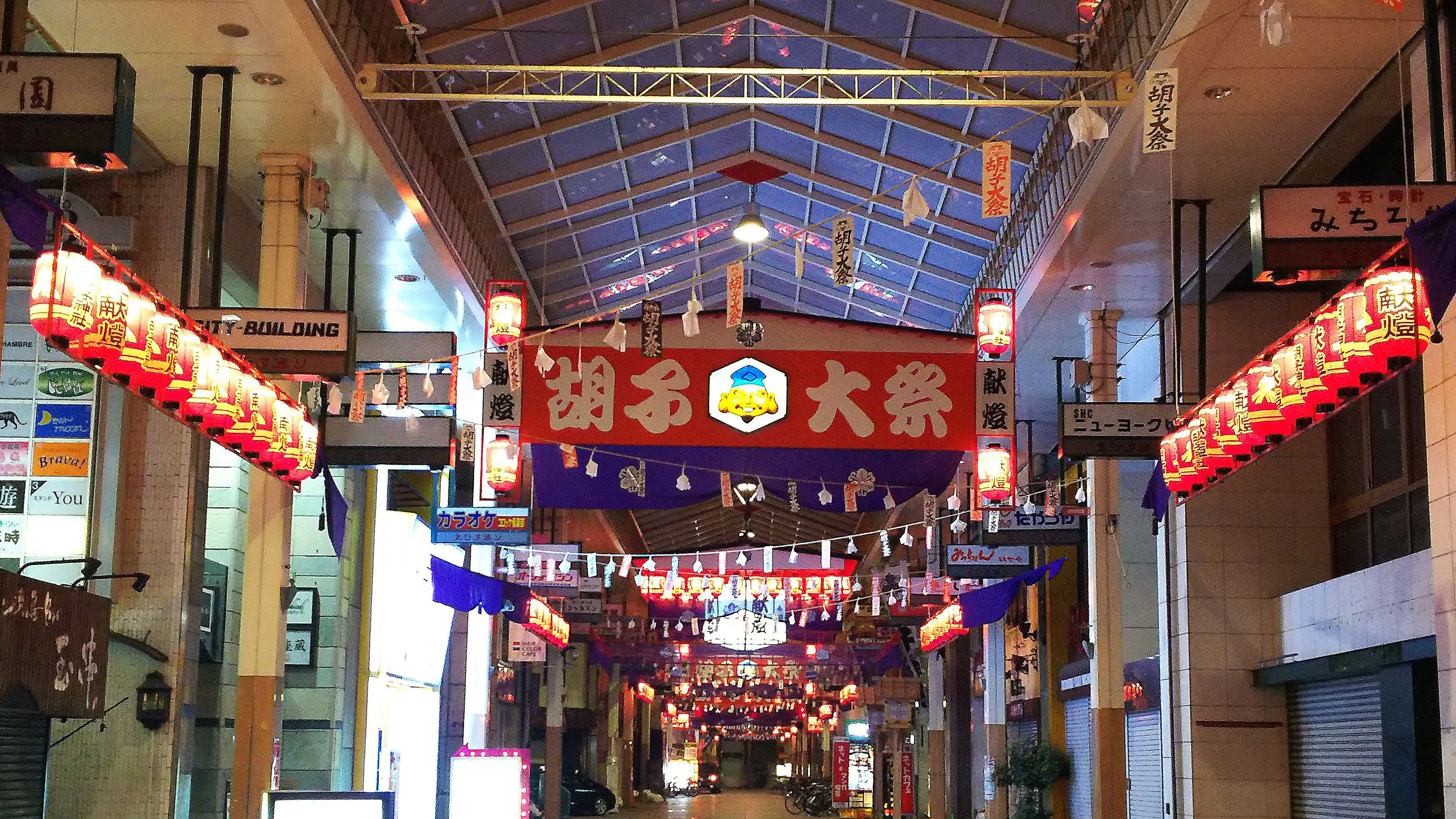 広島市中区のえびす通り。えびす講の飾りつけ時。